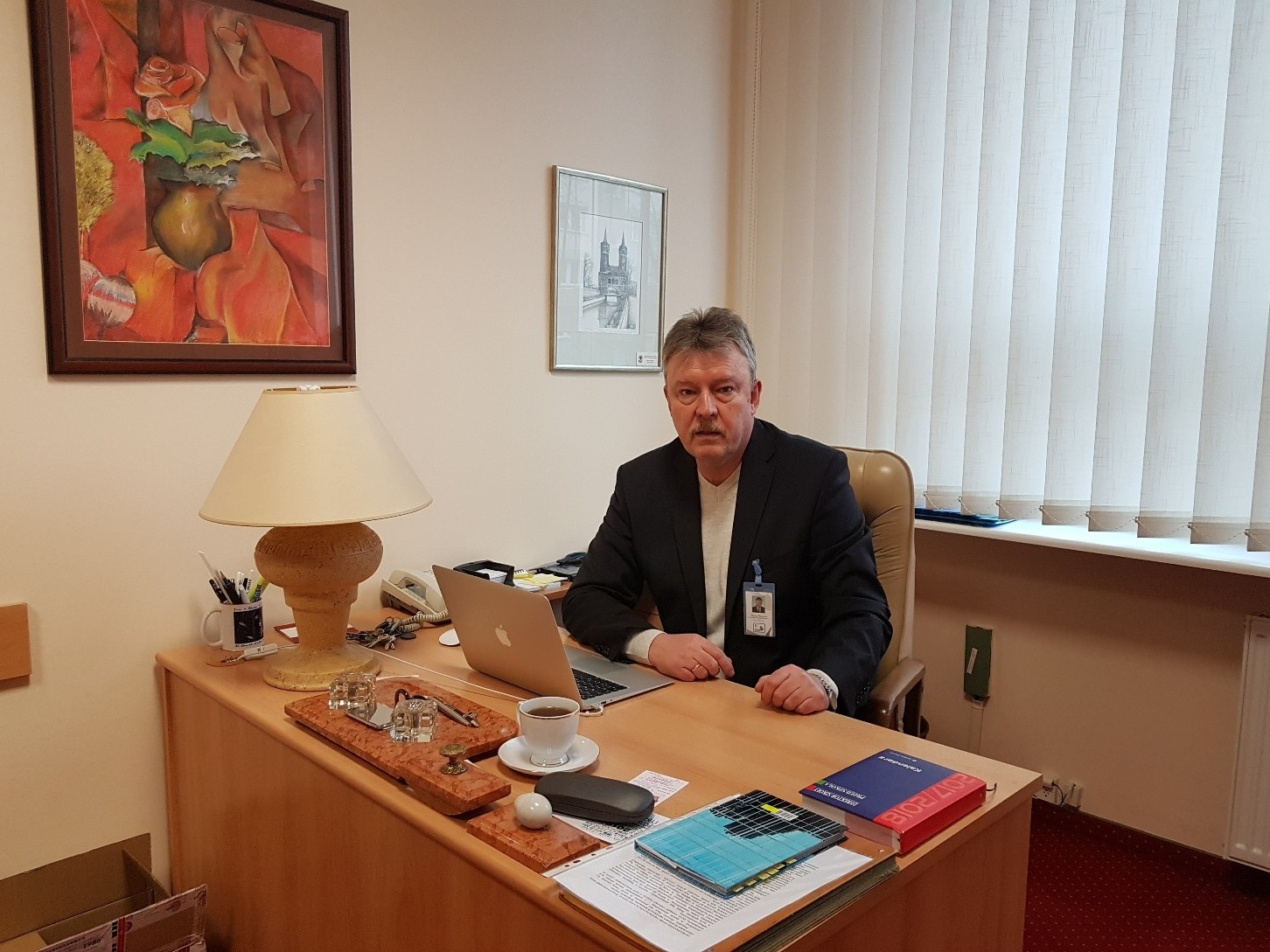 Marcin Przepióra, były zawodnik Spójni z lat 1970-78, obecnie dyrektor ZS nr 2